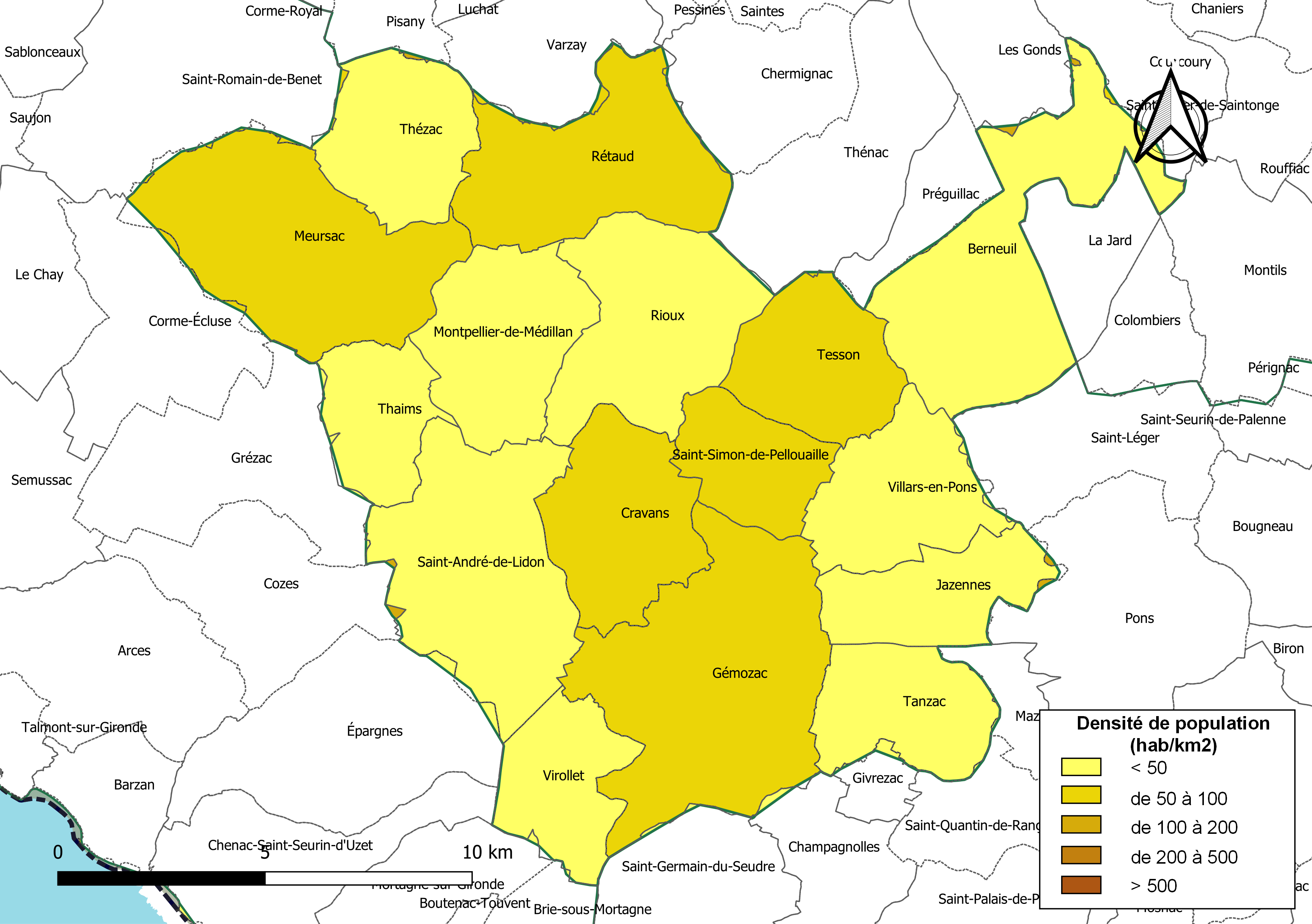 Carte des densités de population (millésimée 2016) des communes de la communauté de communes la Communauté de communes de Gémozac et de la Saintonge Viticole, département de la Charente-Maritime, France. Composition au 1er janvier 2019.